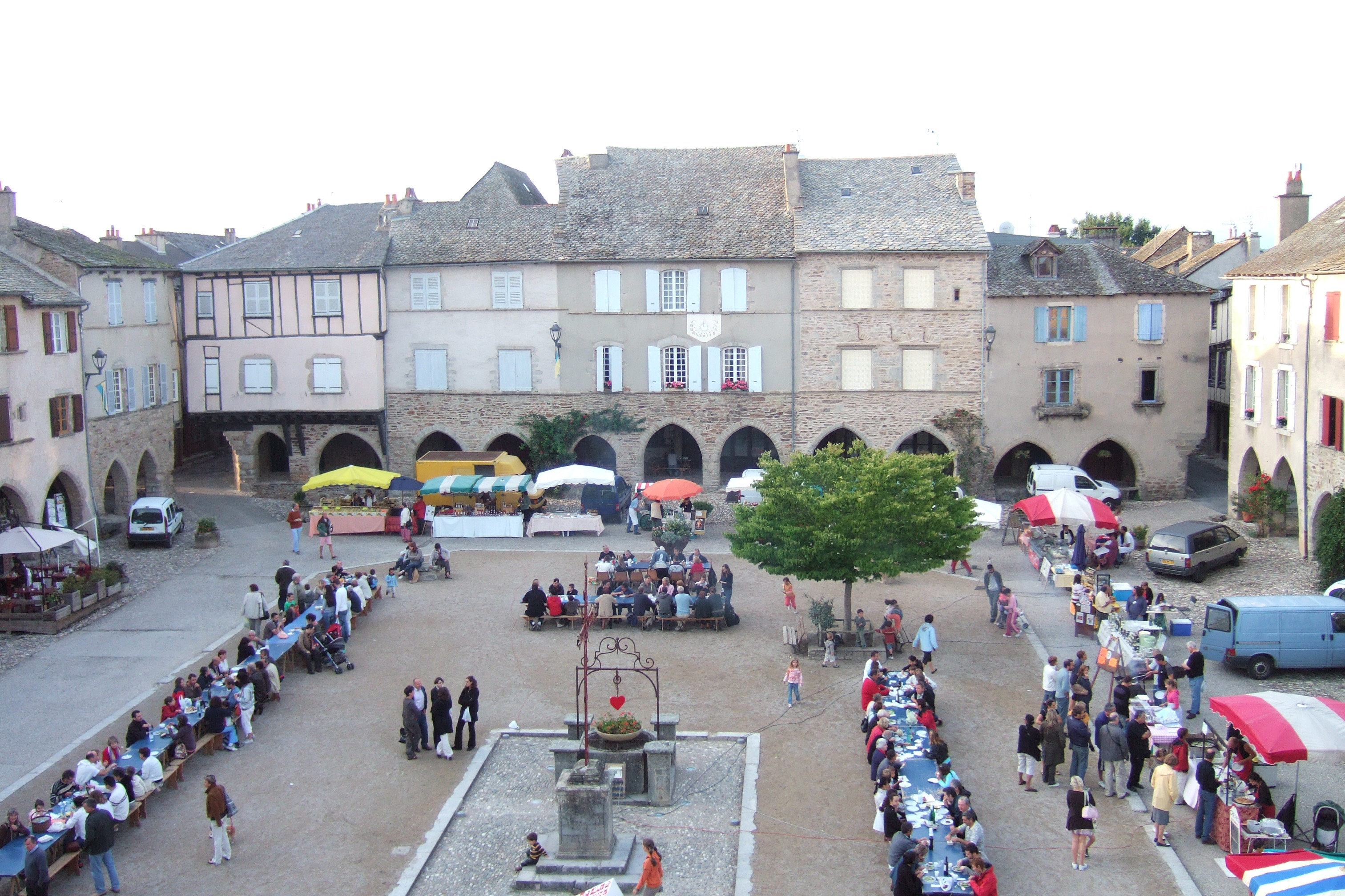 marché de producteurs du vendredi soir, avec repas, Sauveterre-de-Rouergue